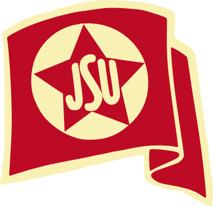 Insignia de las Juventudes Socialista Unificadas